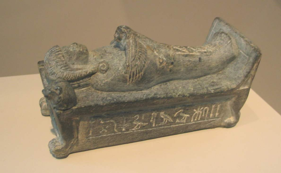 Union de l'âme-Ba avec la momie du prince Thoutmosis. Statuette funéraire de la XVIIIe dynastie. Conservée à Berlin.